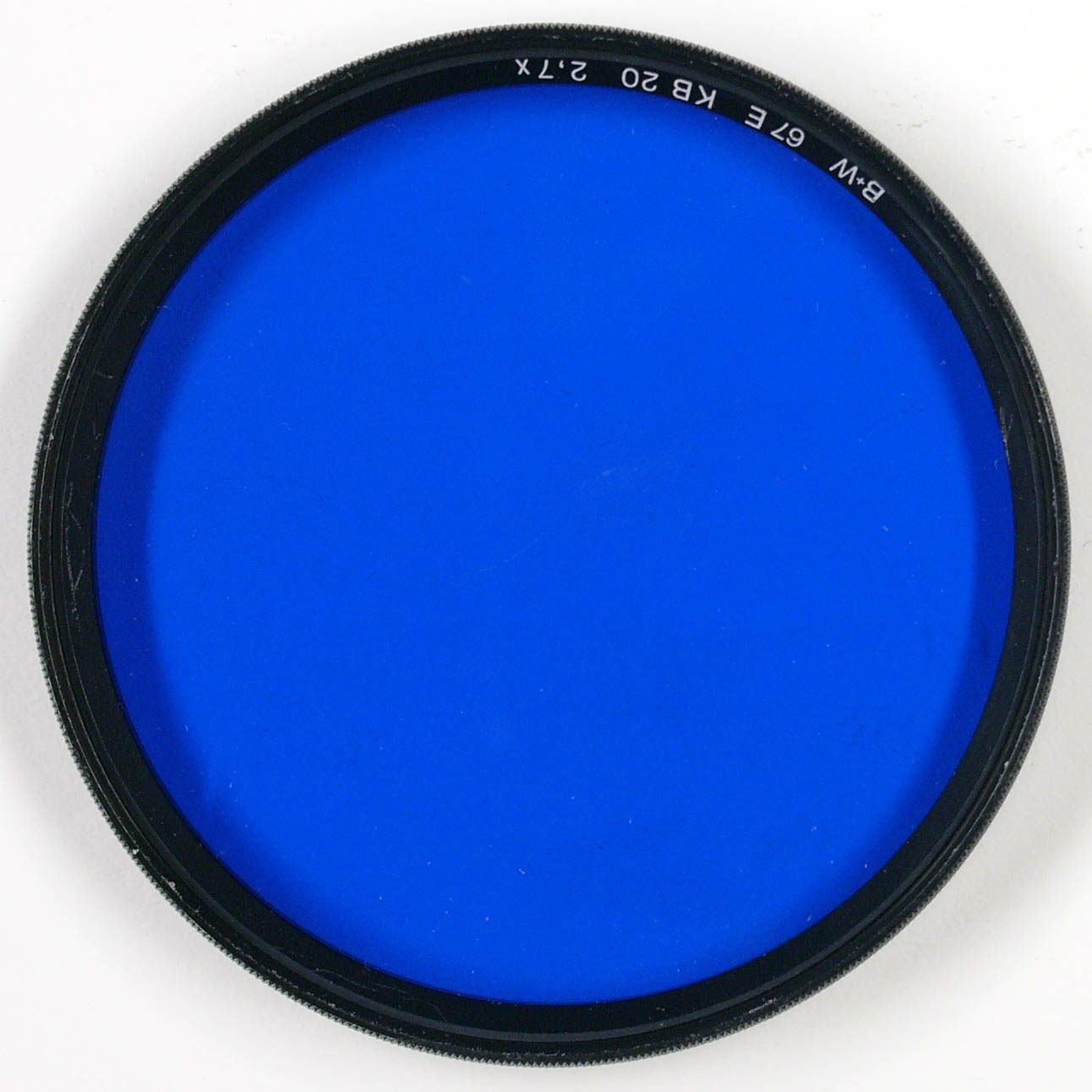 Filter KB20